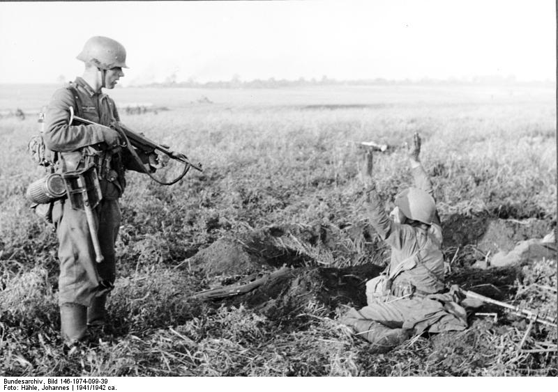 Überall werden sie aus ihren Erdlöchern hervorgeholt,...